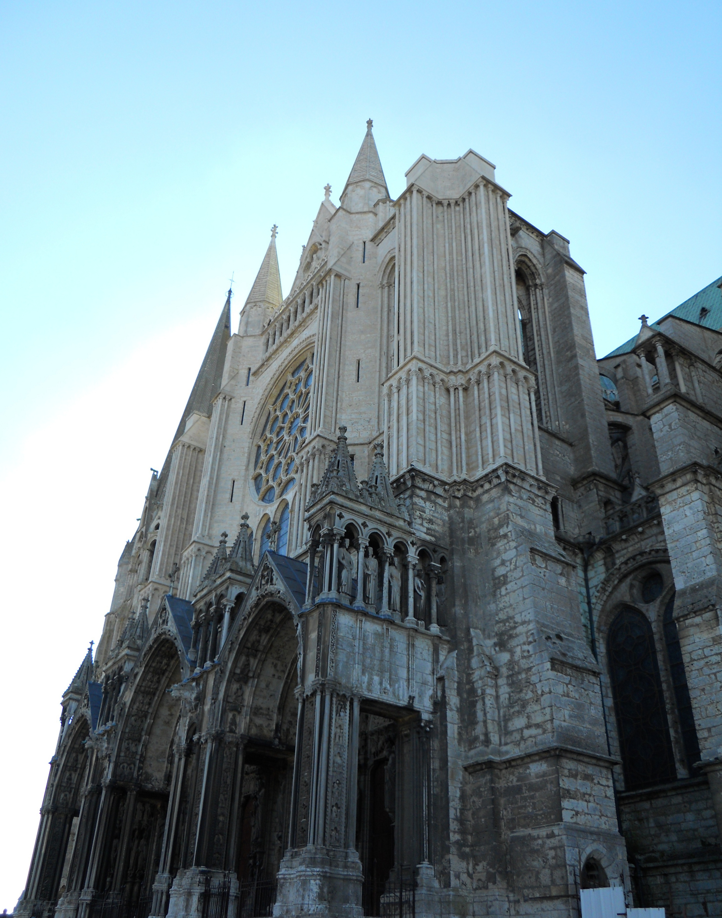 La Cathédrale de Chartres